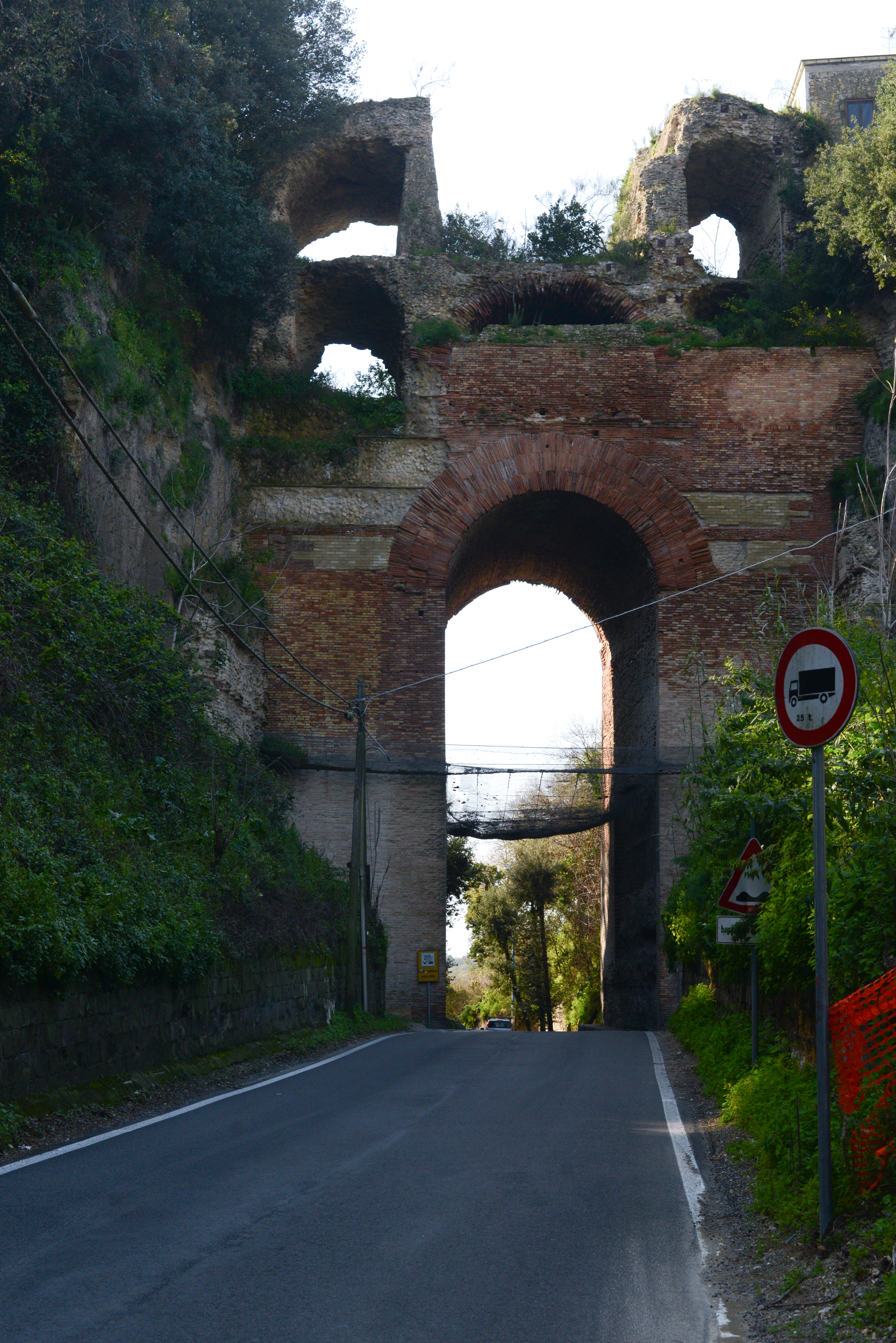 L'Arco Felice romano, Pozzuoli